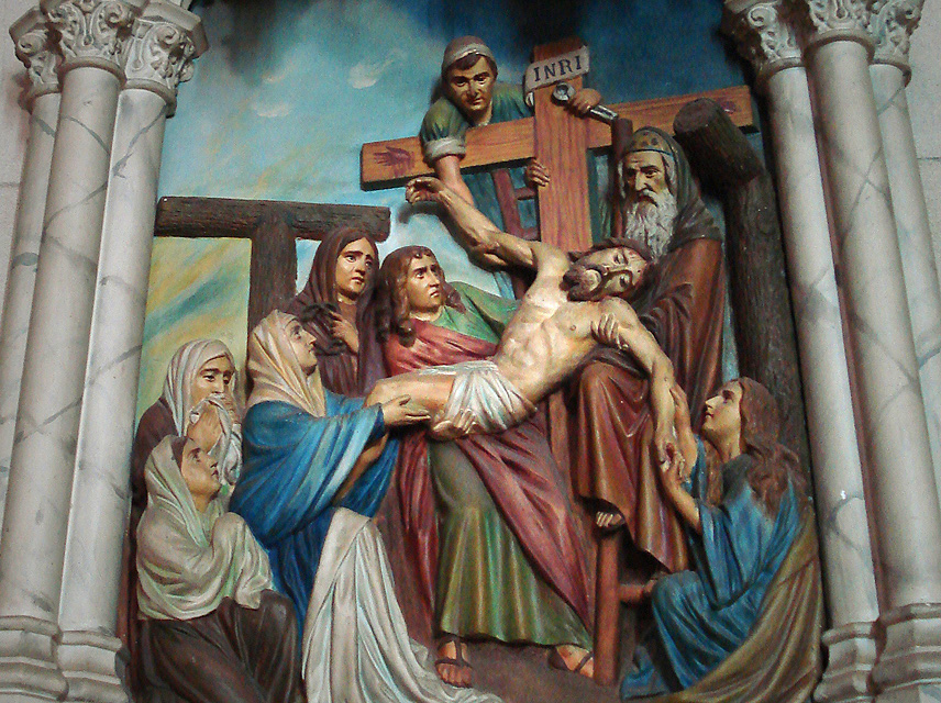 Deposição, interior da Igreja de Santa Teresinha, Porto Alegre, Brasil.